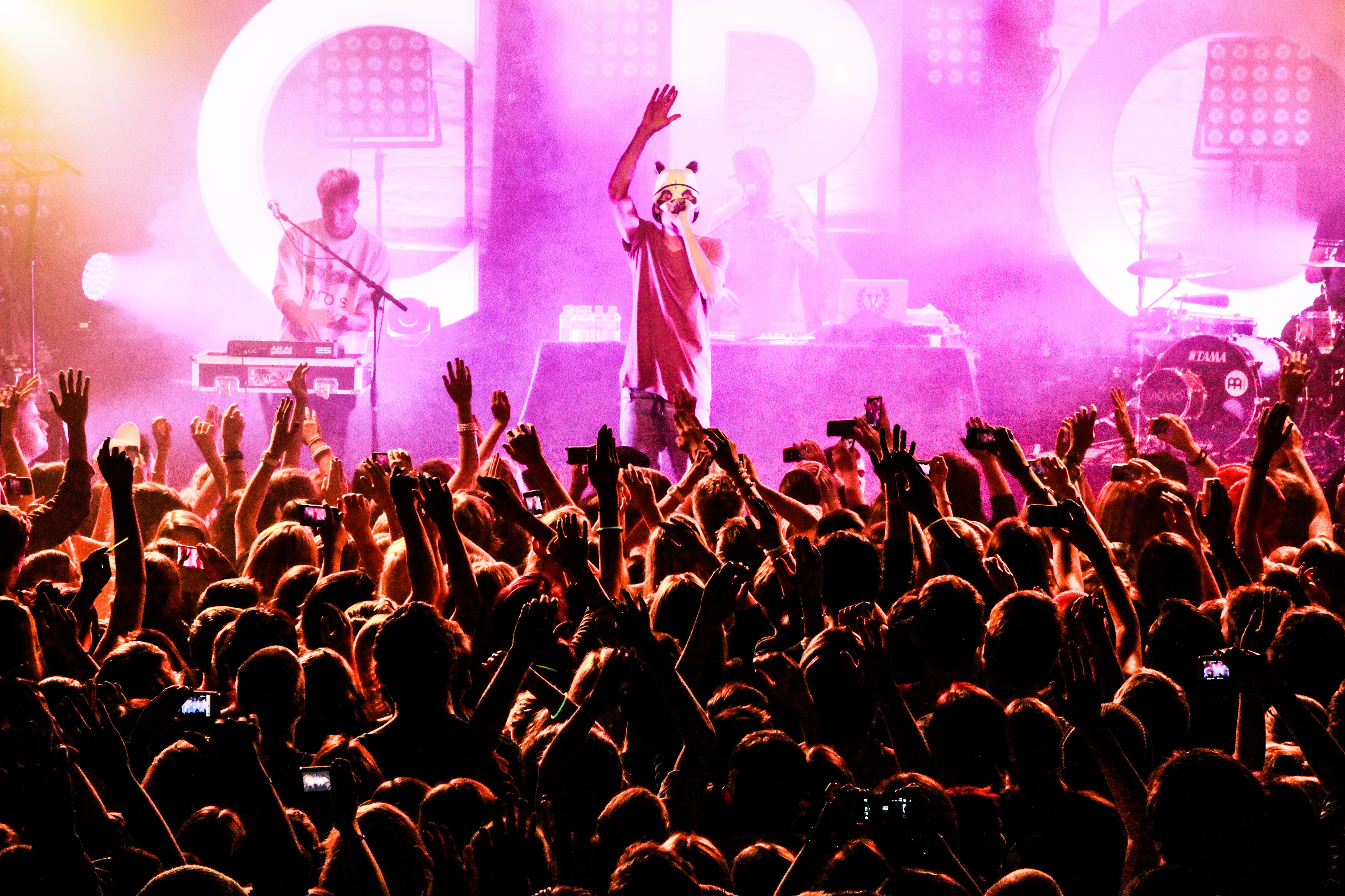 Cro im Rockhouse Salzburg